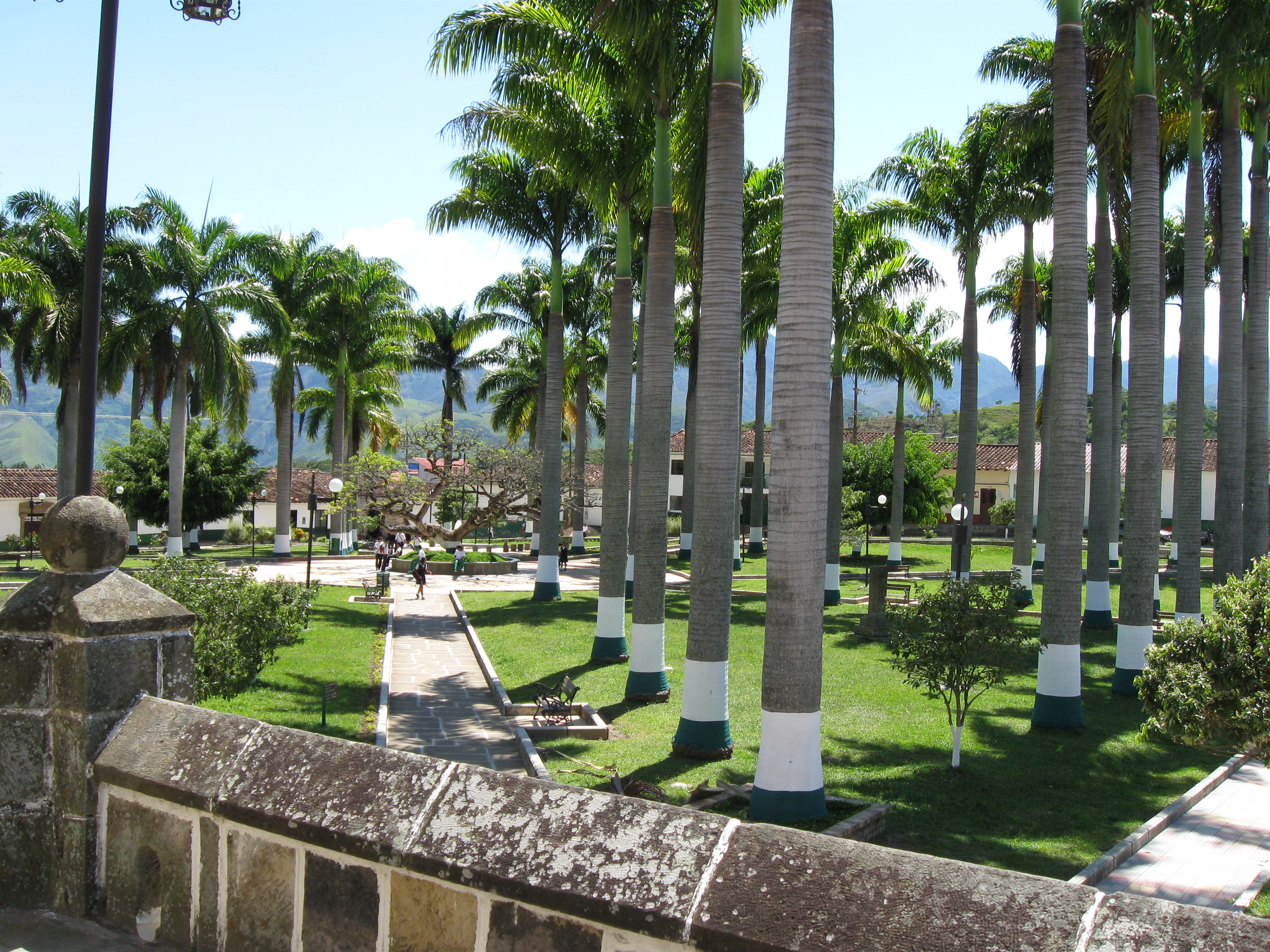 View Parque principal Guadalupe, Santander